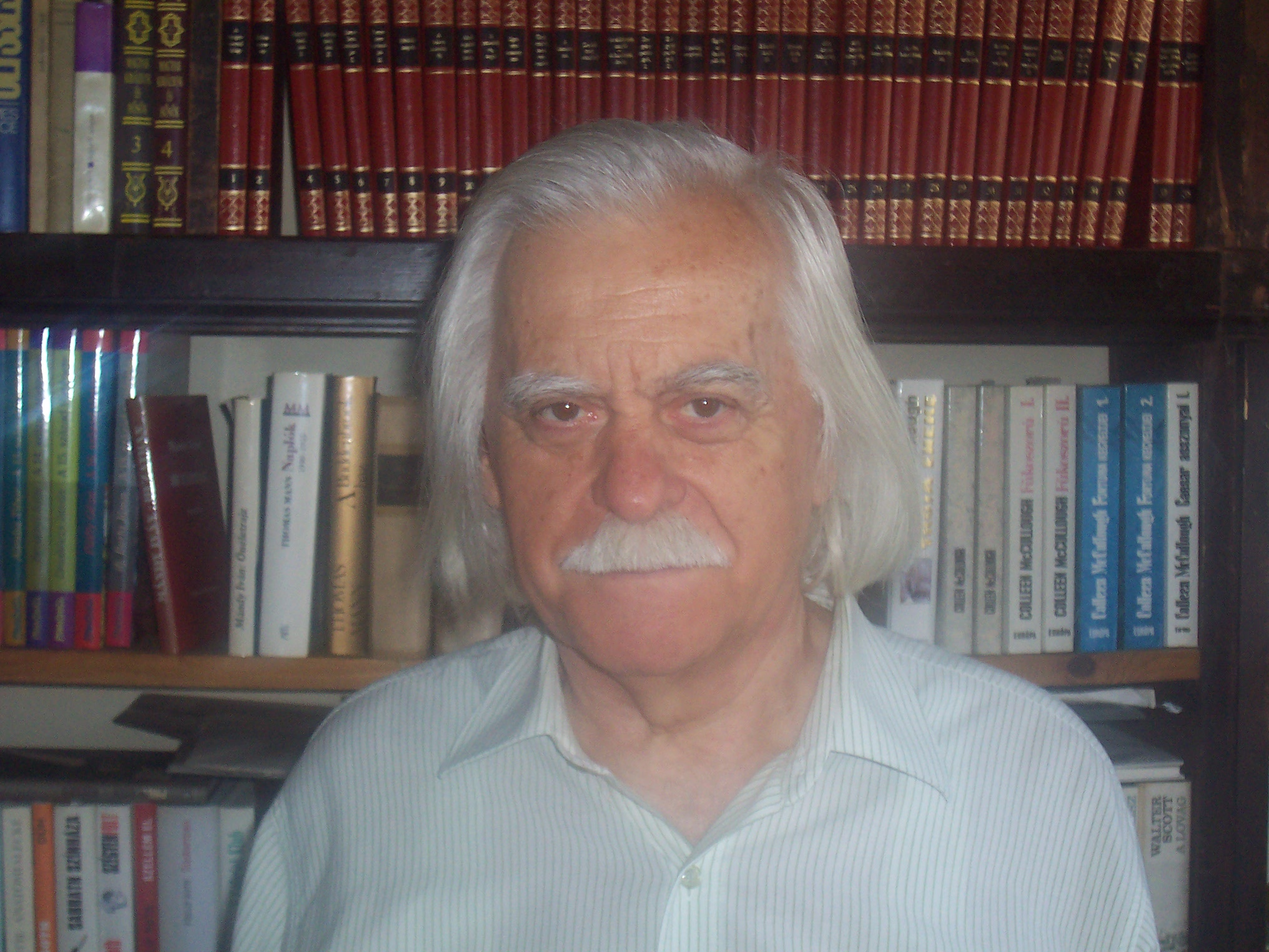 Katona Tamás történész, diplomata, politikus